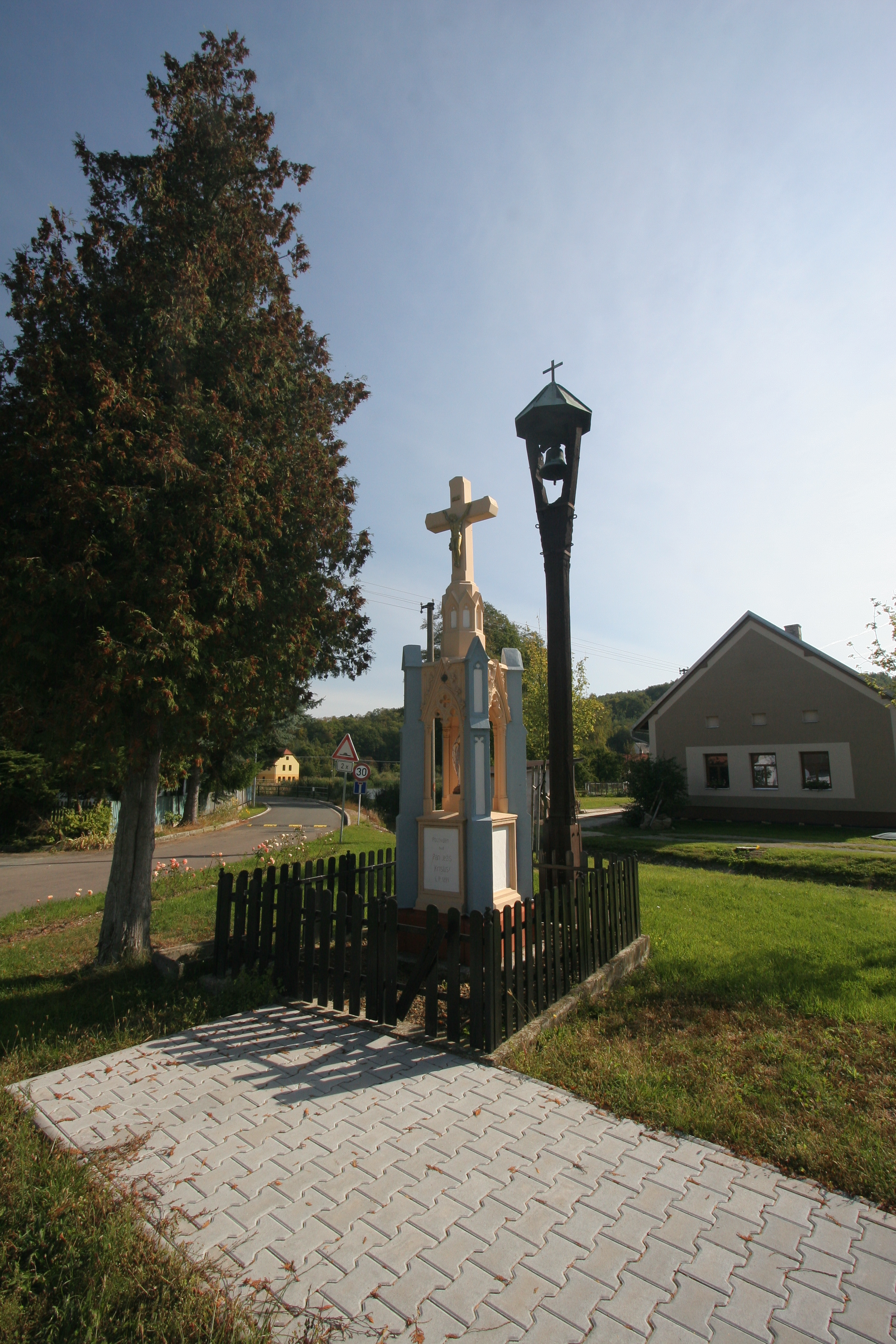 Brloh zvonička a křížek